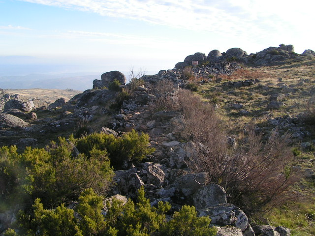 Vista parcial sobre parte da muralha das Portas do Montemuro. Foto realizada pelo autor do upload